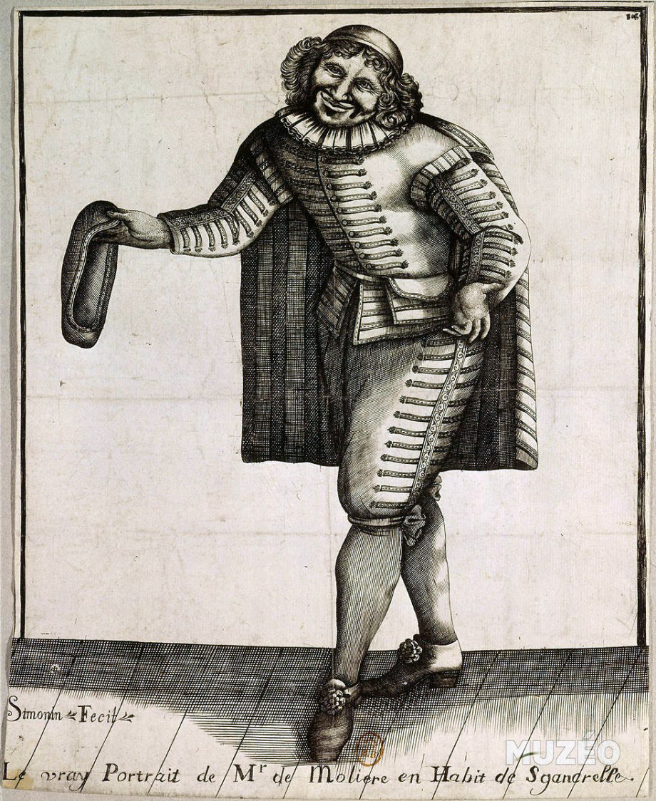 Estampe